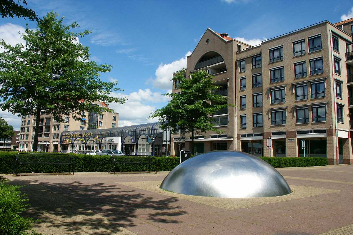 Burchtplein, Oss, Netherlands